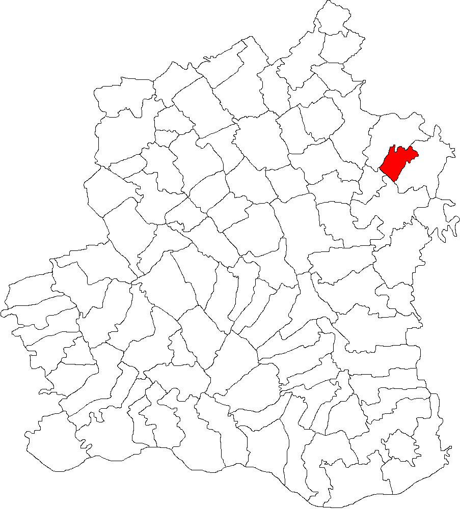 Categorie:Hărţi ale judeţului Teleorman